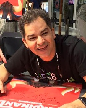 Carlos Saldanha au festival international du film d'animation d'Annecy 2017